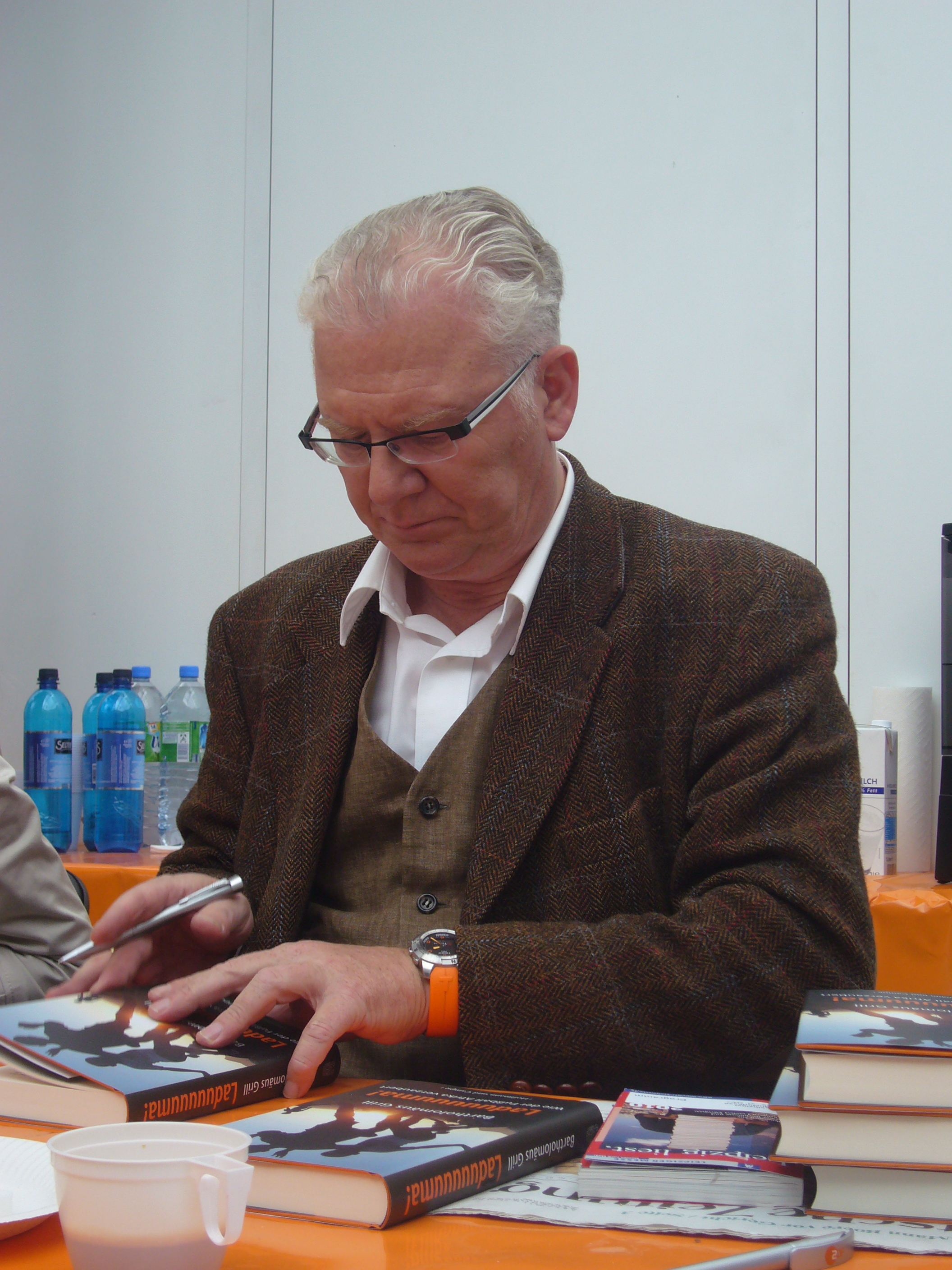 Dieses Fotos dürfen Sie honorarfrei nutzen, wenn Sie folgenden credit beachten: Copyright: Das blaue Sofa / Club Bertelsmann. Bartholomäus Grill berichtet seit 18 Jahren für „Die Zeit“ t aus Afrika und gehörte zum afrikapolitischen Beraterkreis von Bundespräsident Horst Köhler. Er erhielt zahlreiche Auszeichnungen, u. a. den Egon-Erwin-Kisch-Preis.